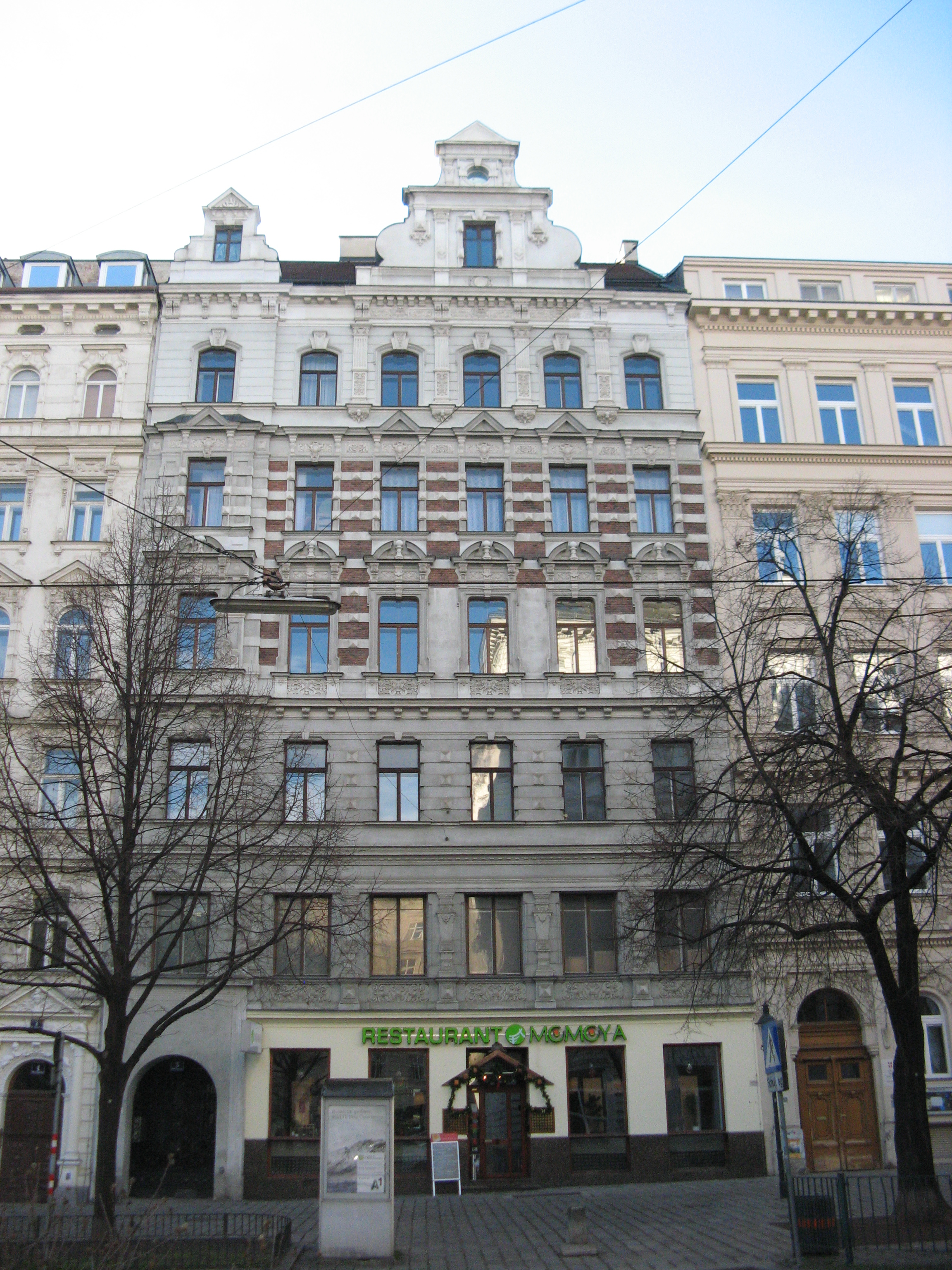 Haus Börsegasse 3 (1892-93) von Ludwig A. Fuchsik, Wien-Innere Stadt